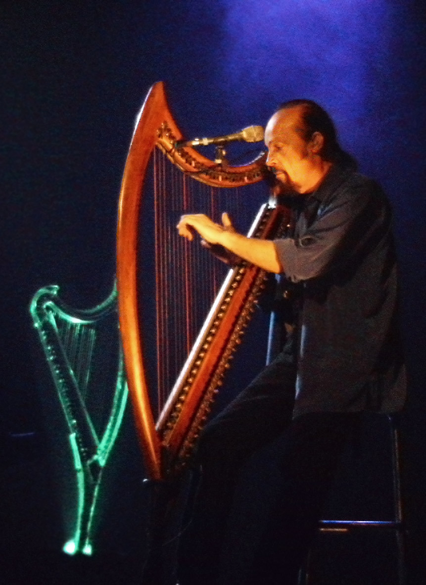 Alan Stivell en concert à Bonchamp les Laval en octobre 2003.